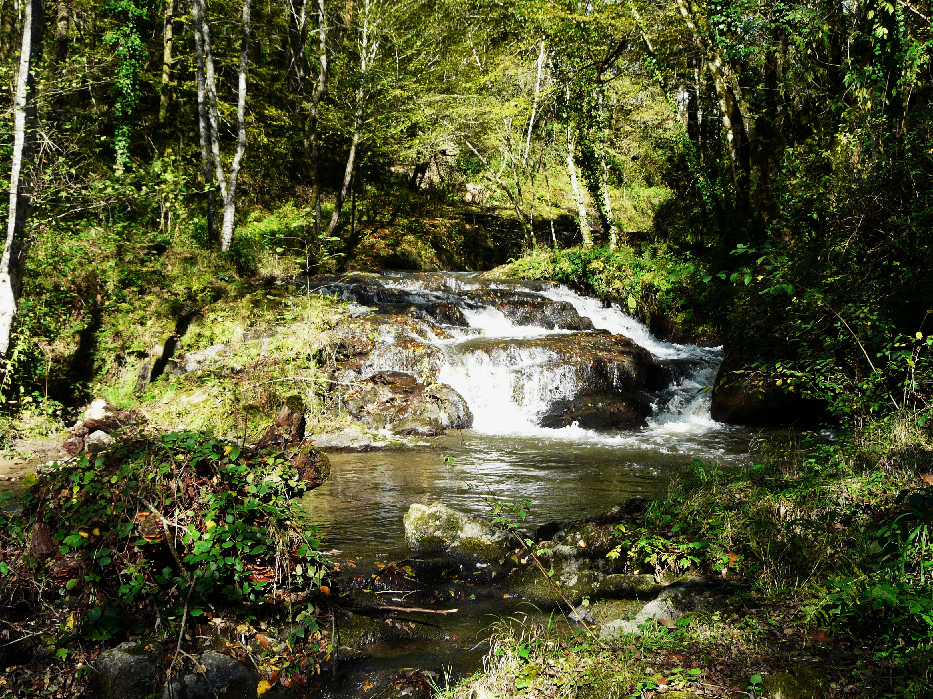 Le ruisseau du Clan en contrebas des Trois-Villages, Allassac, Corrèze, France